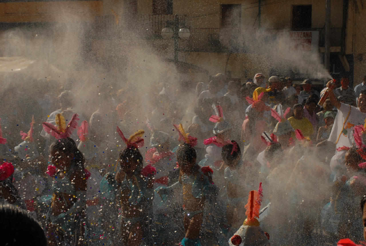 Carnaval de Blancos Y Negros de Pasto, Colombia.